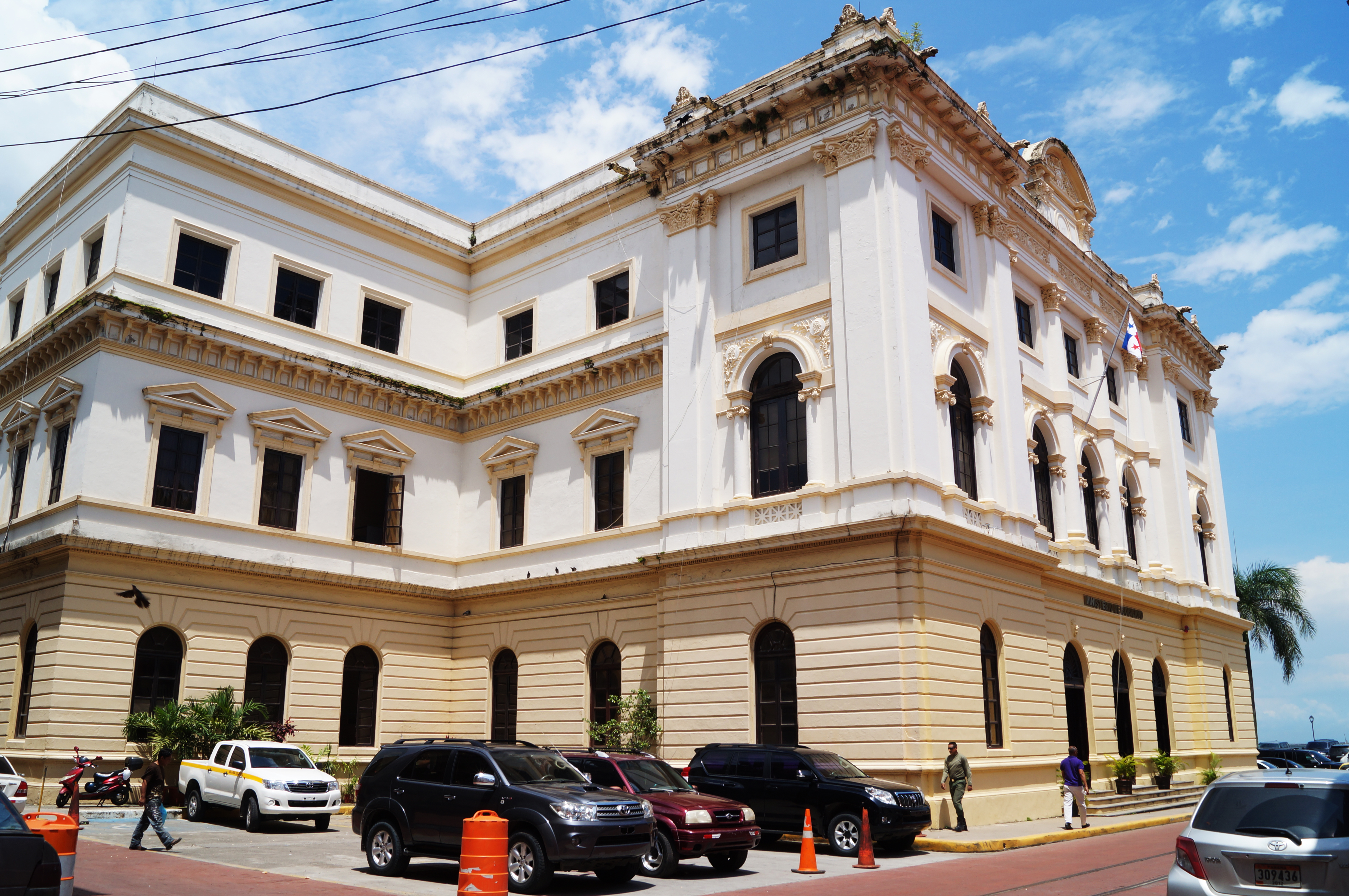 CASCO ANTIGUO